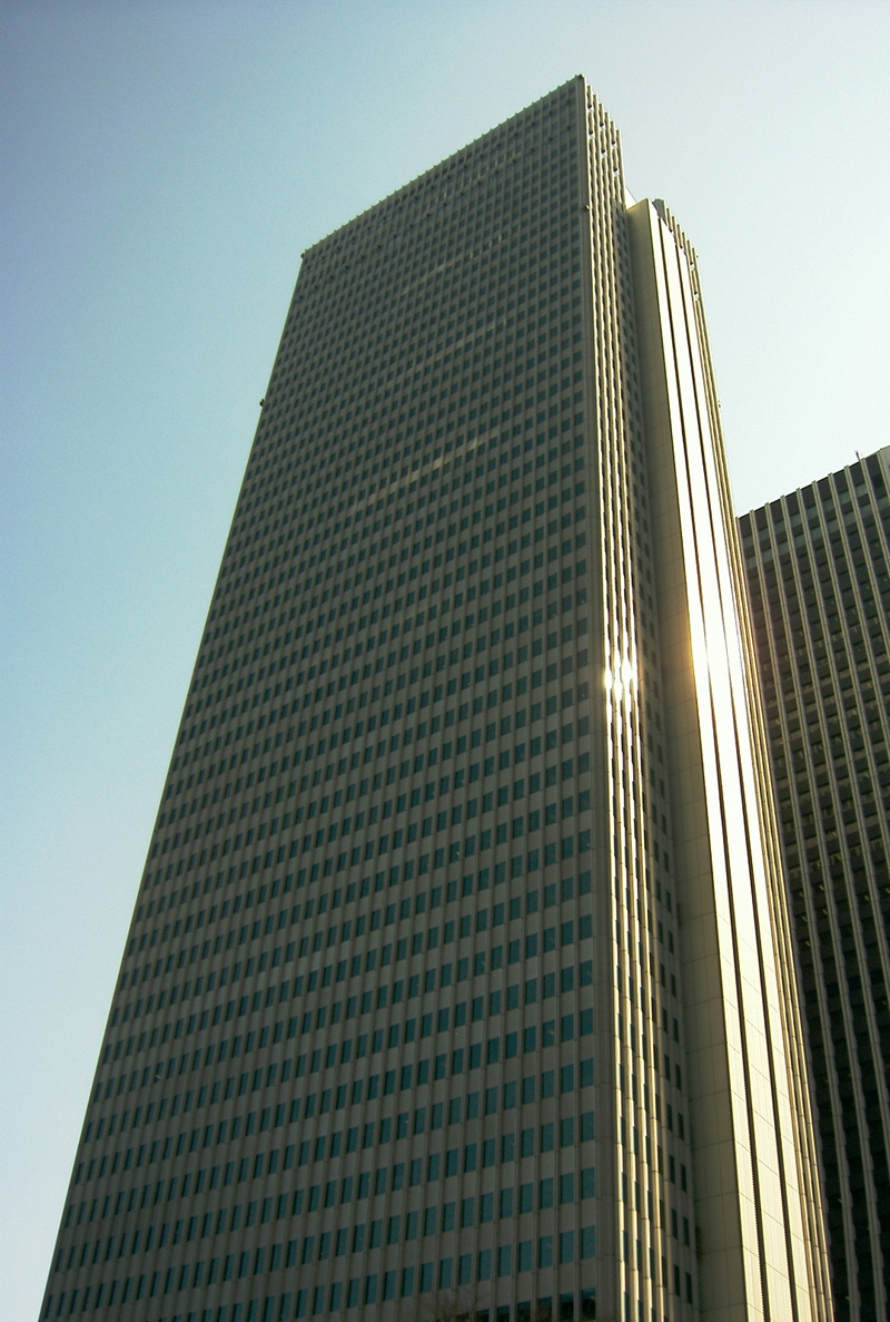 Shinjuku nomura Building_ Tokyo Japan